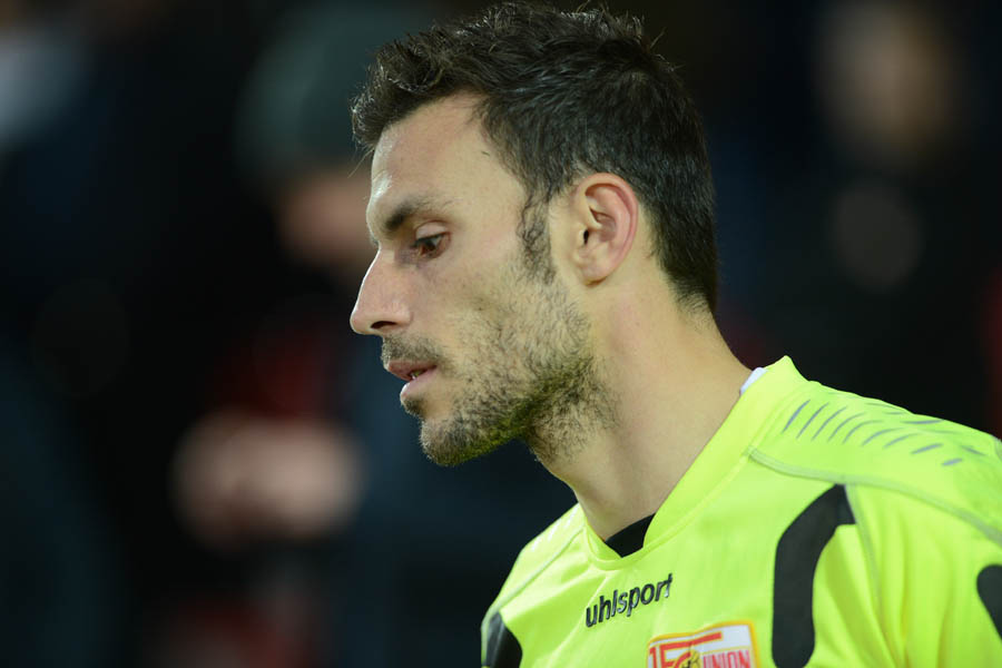 Daniel Haas vor dem Auflaufen